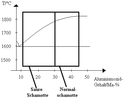 Lage von Schamottesteinen im Zweistoffsystem Aluminiumoxid-Siliziumdioxid